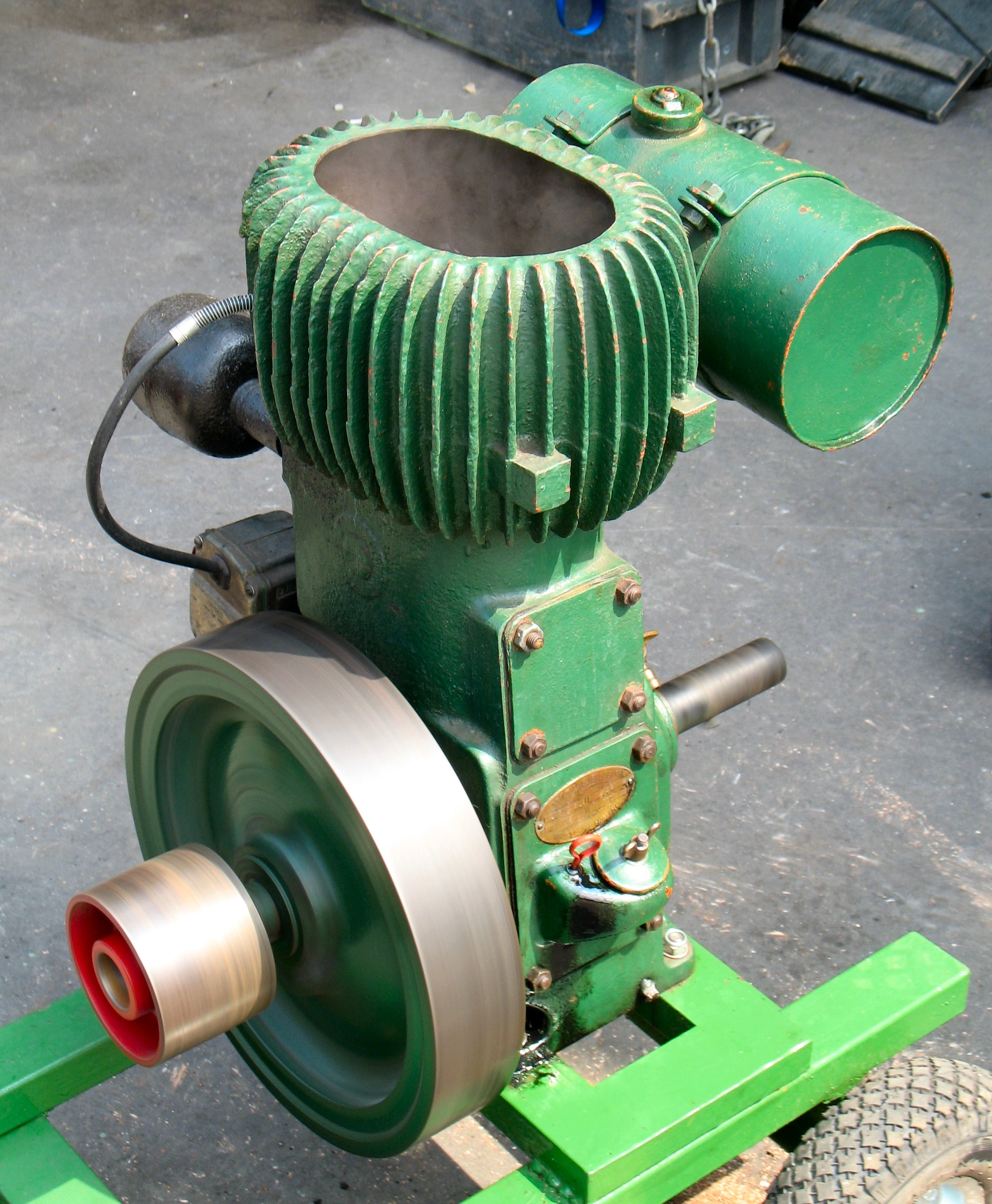 Stationärmotor der Firma Wolseley Technische Daten: Typ: WD 9 Leistung: 1,5 - 2,0 PS Drehzahl: 600 - 700 Umdrehungen/min Gewicht: ca. 100 kg Hesteller: Wolseley Engineering LTB Birmingham England Brennstoff: Benzin Kühlung: Wasser-Verdampfer Baujahr: zwischen 1943 und 1972